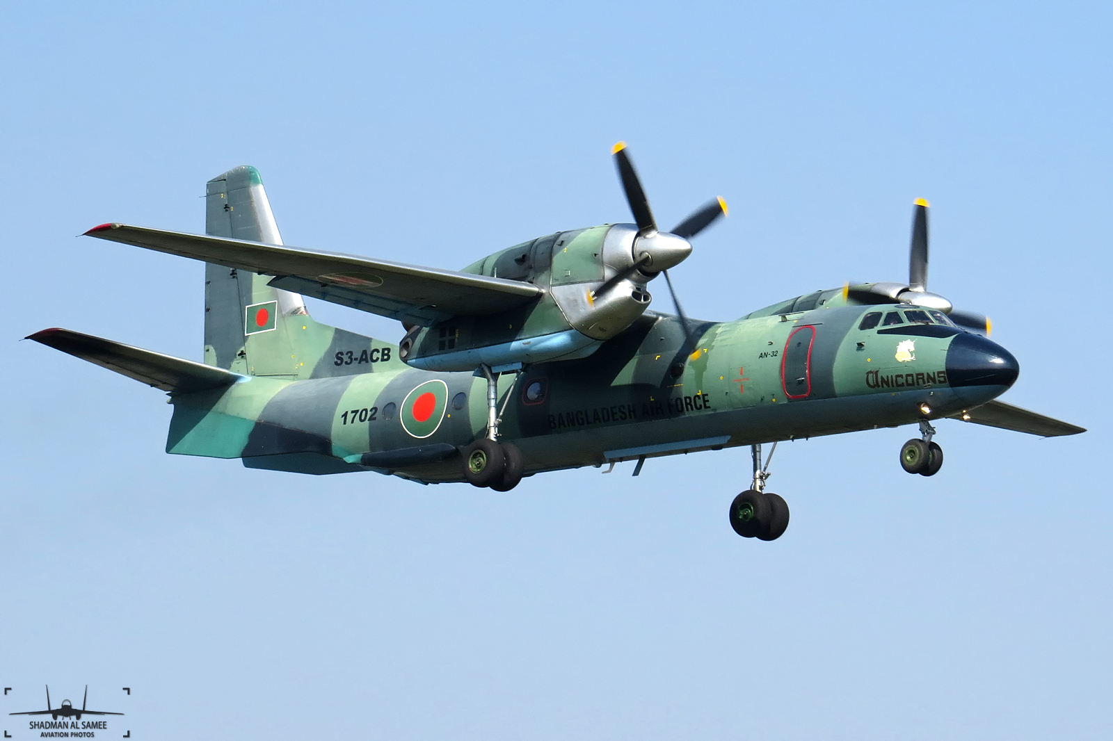 VGHS/ VDP 2016.